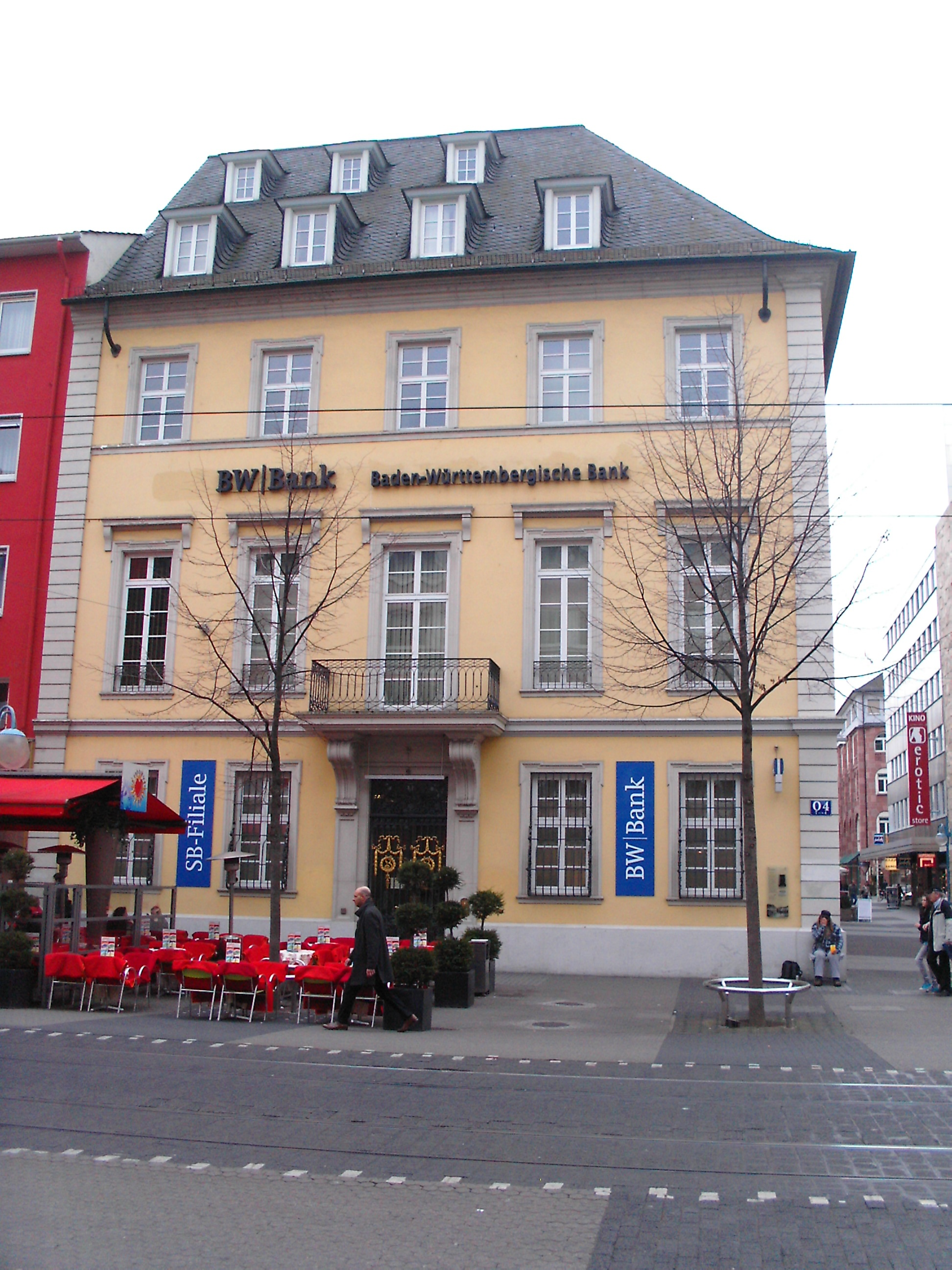 Mannheim, O4, 4, ehemaliges Bankhaus Schmalz, später Stumm